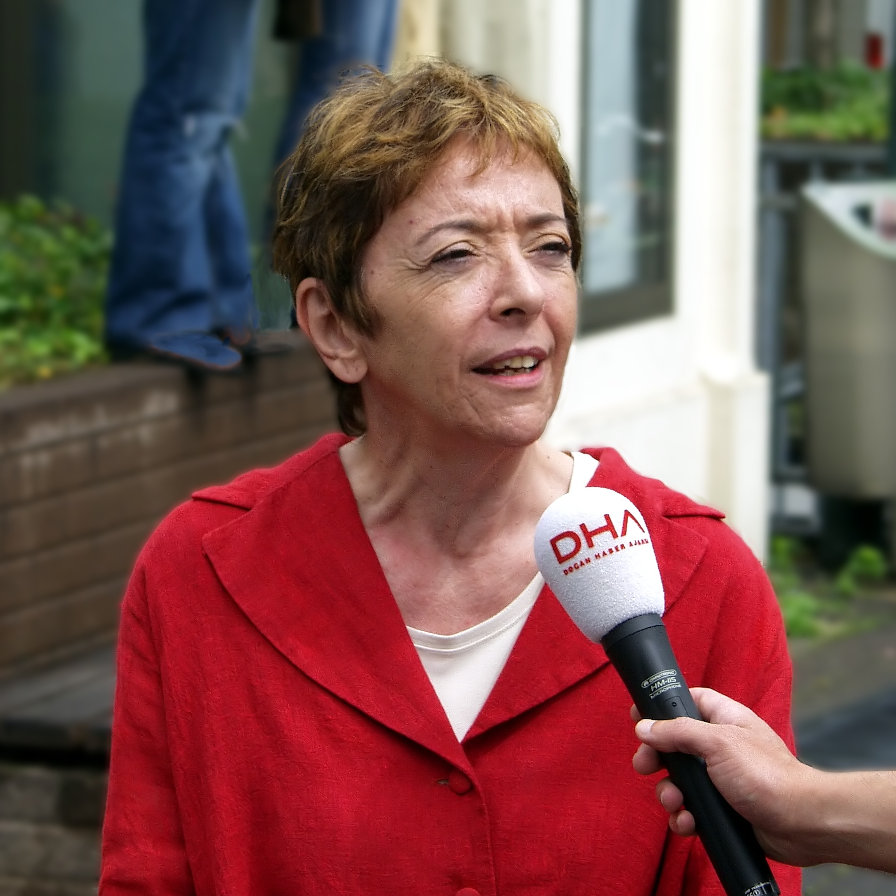 Lale Akgün wird auf der Demonstration zum Bau einer Moschee in Köln-Ehrenfeld von der türkischen Nachrichtenagentur Doğan Haber Ajansı interviewt.